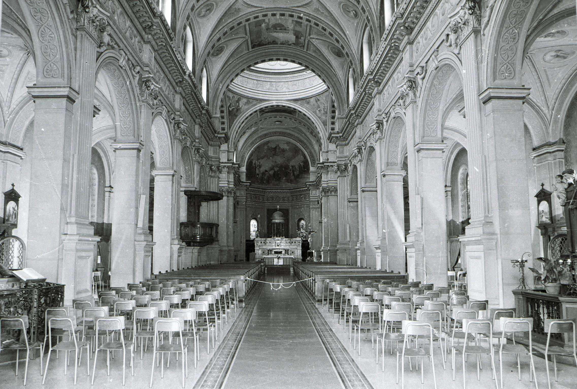 Celso Mosca, Chiasso,Chiesa S. Vitale, interno